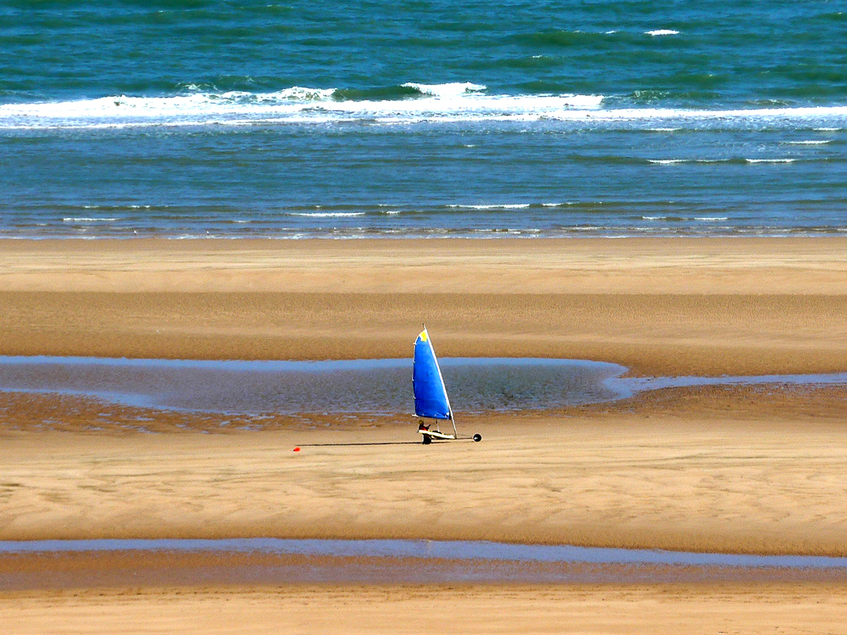 Land sailing in Normandia.